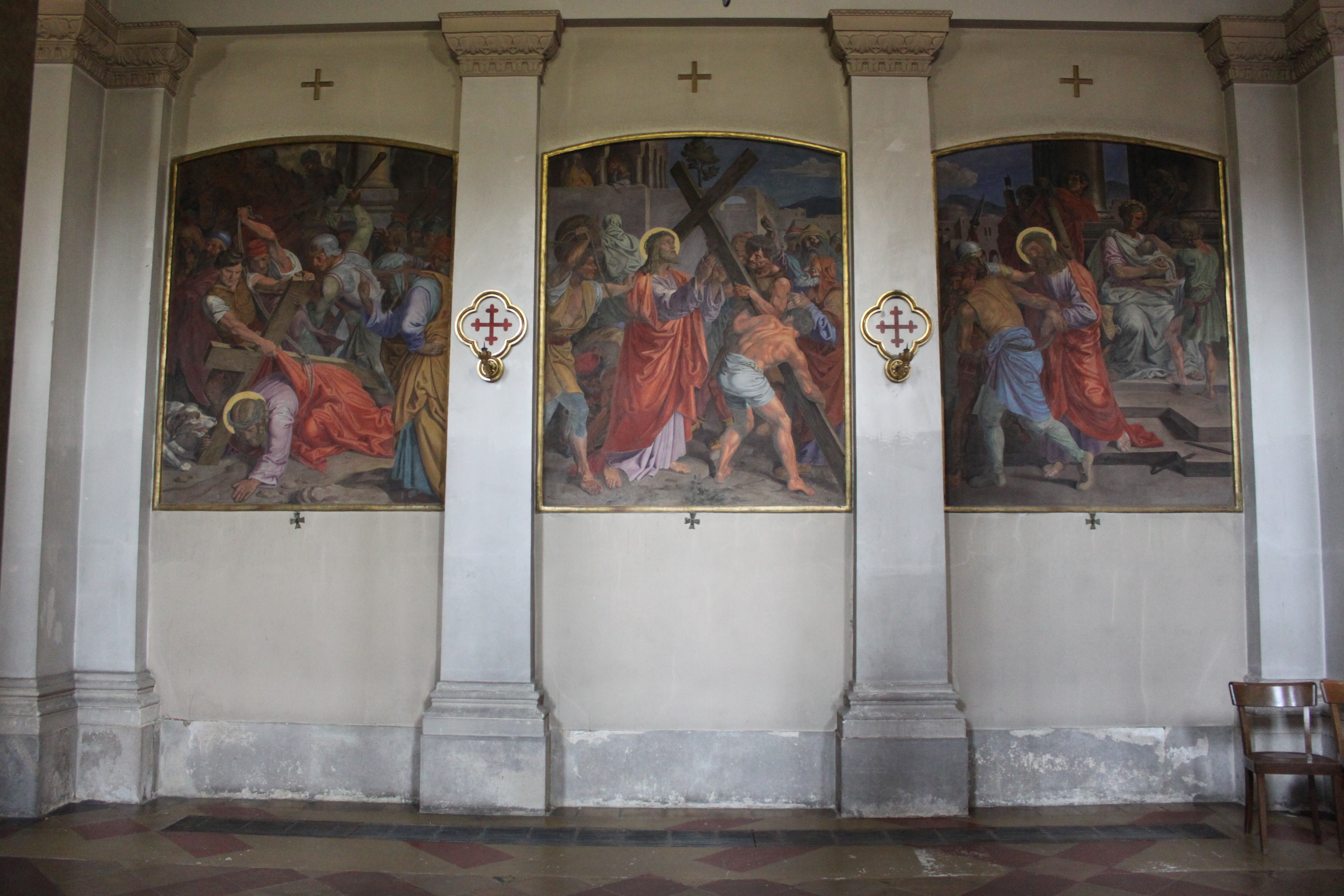 Kath. Pfarrkirche, hl Johannes Nepomuk, Kreuzweg von Joseph von Führich (1844-1846), Drei-Bilder-Kombination